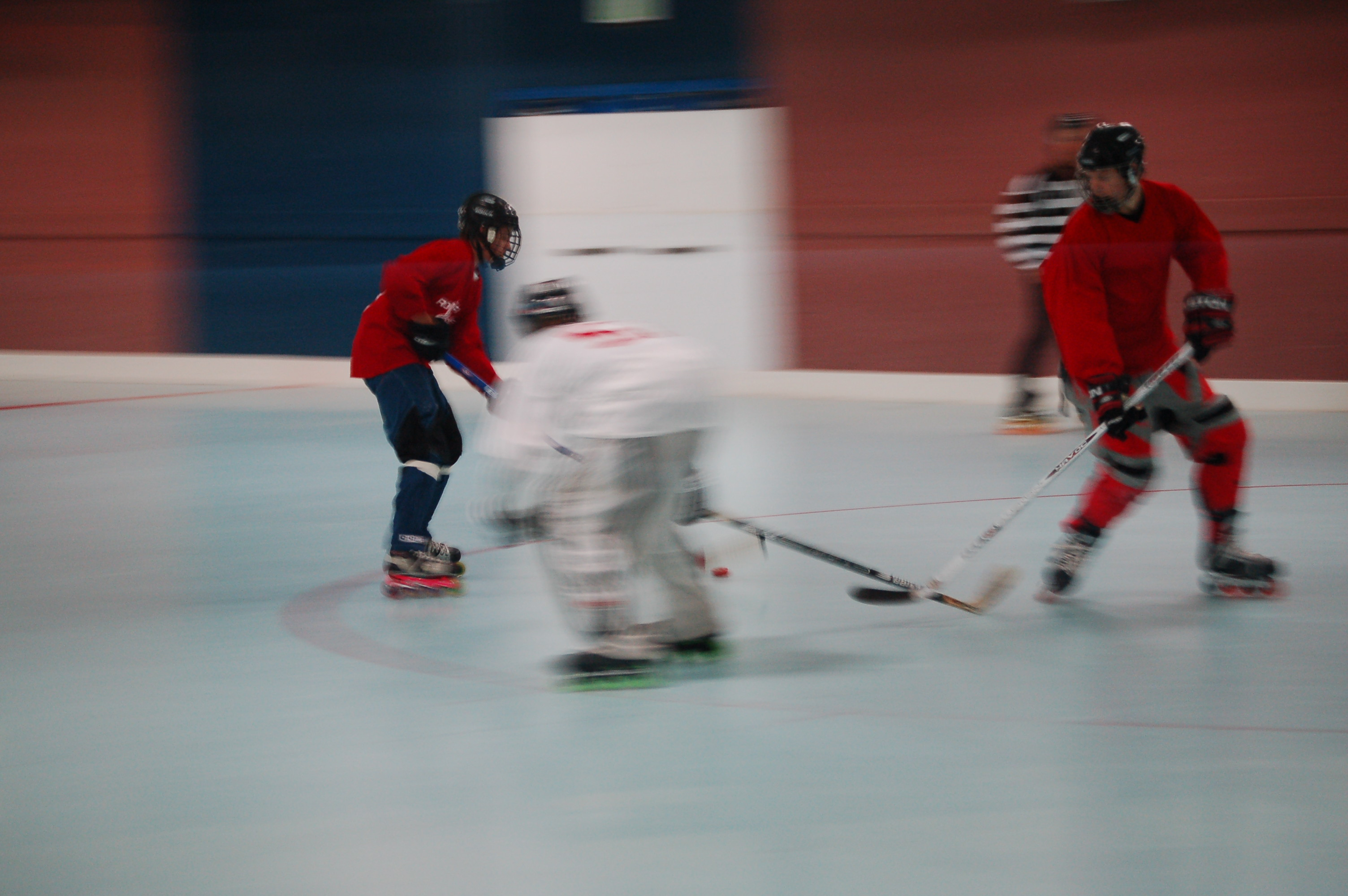 Inline Hockey at Albuquerque